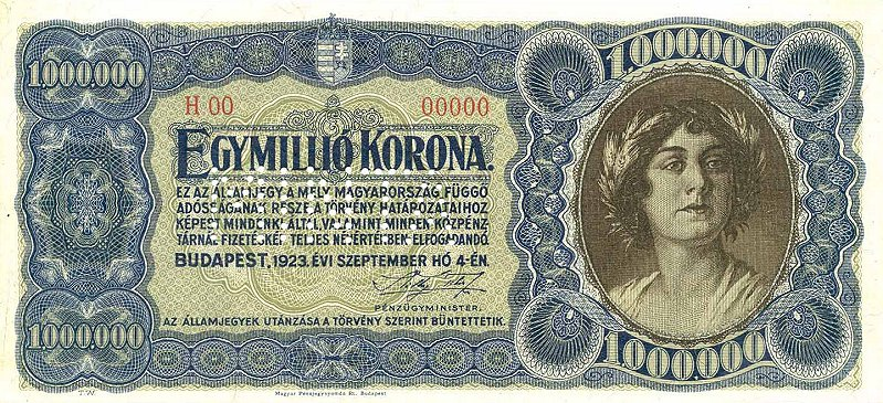 1 000 000 Hungarian korona (1923) by Magyar Pénzjegynyomda Rt. (Budapest) - obverse